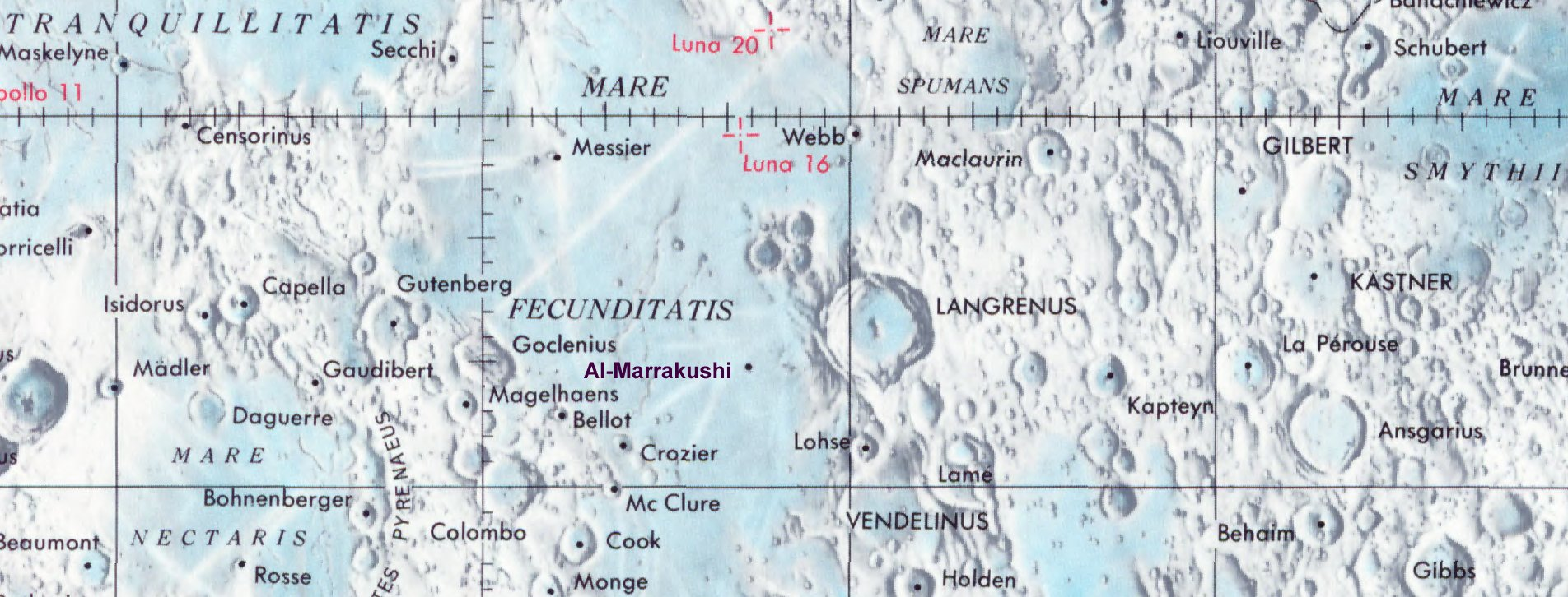 Cráter lunar Al-Marrakushi. Localización. (Lunar Chart LPC1. Second Edition)